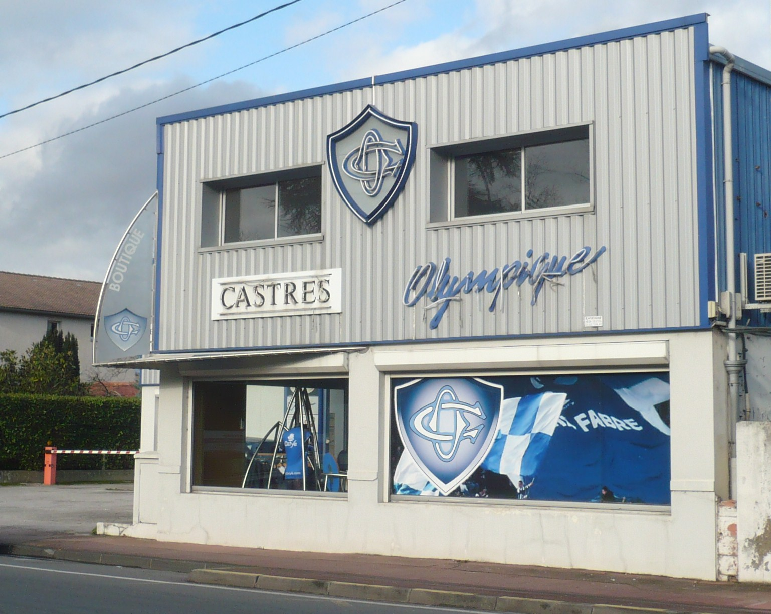 Boutique et administration du club de rugby à XV Castres olympique.